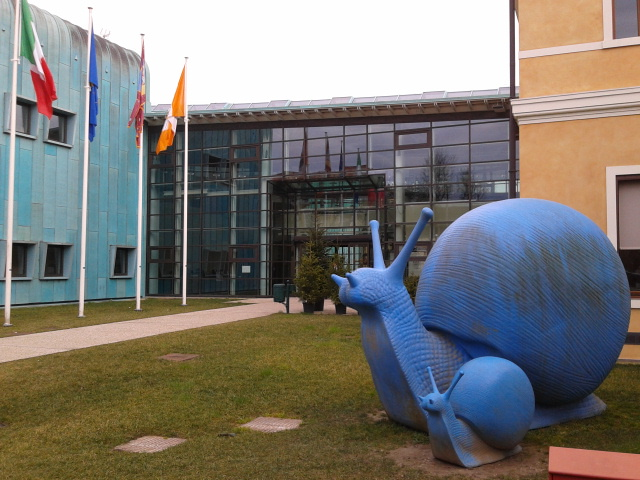 Ingresso principale della sede dell'Amministrazione provinciale di Treviso presso l'ex ospedale psichiatrico provinciale "Sant'Artemio" di Treviso